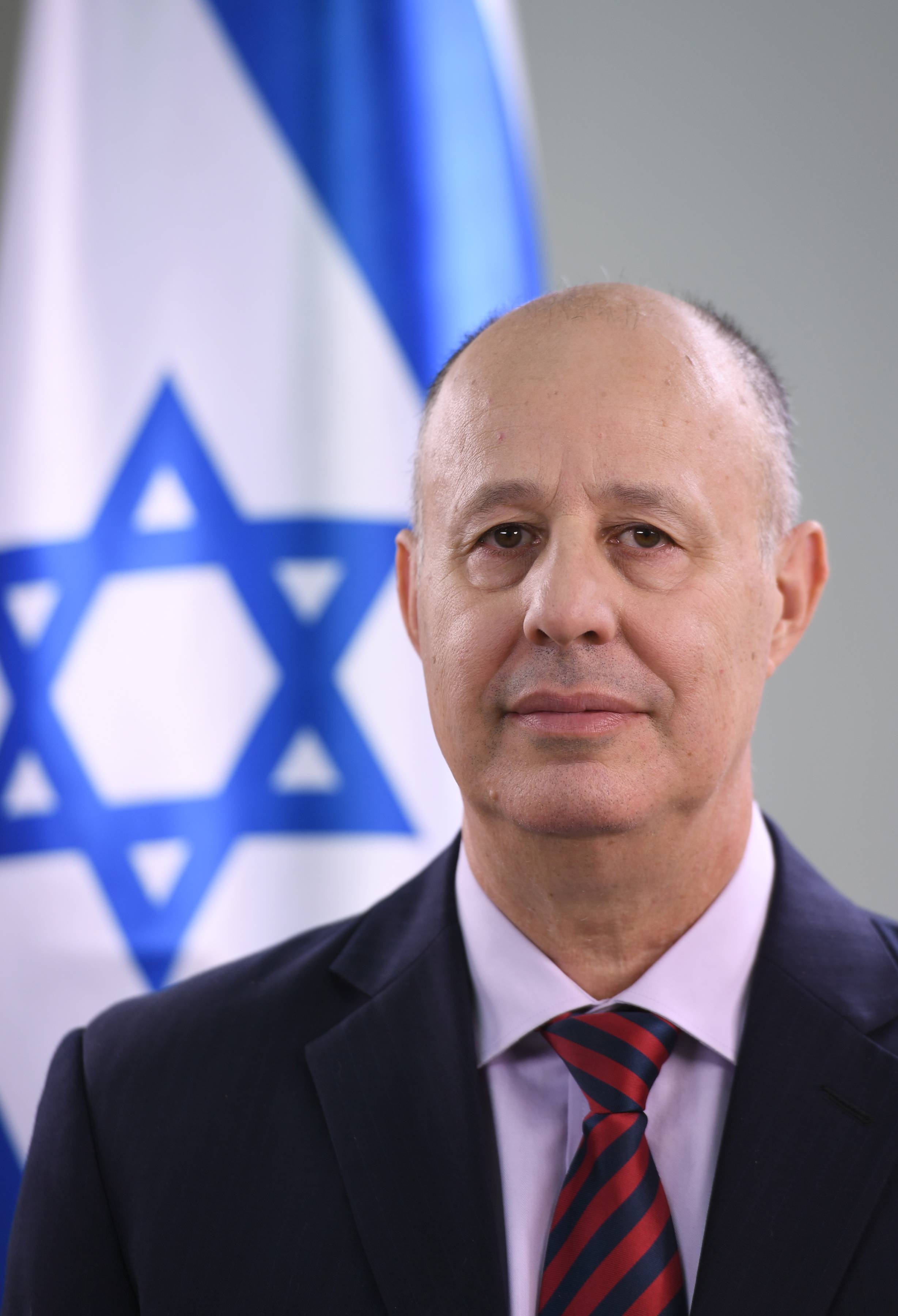 Depicted person: Tzachi Hanegbi – Israeli politician